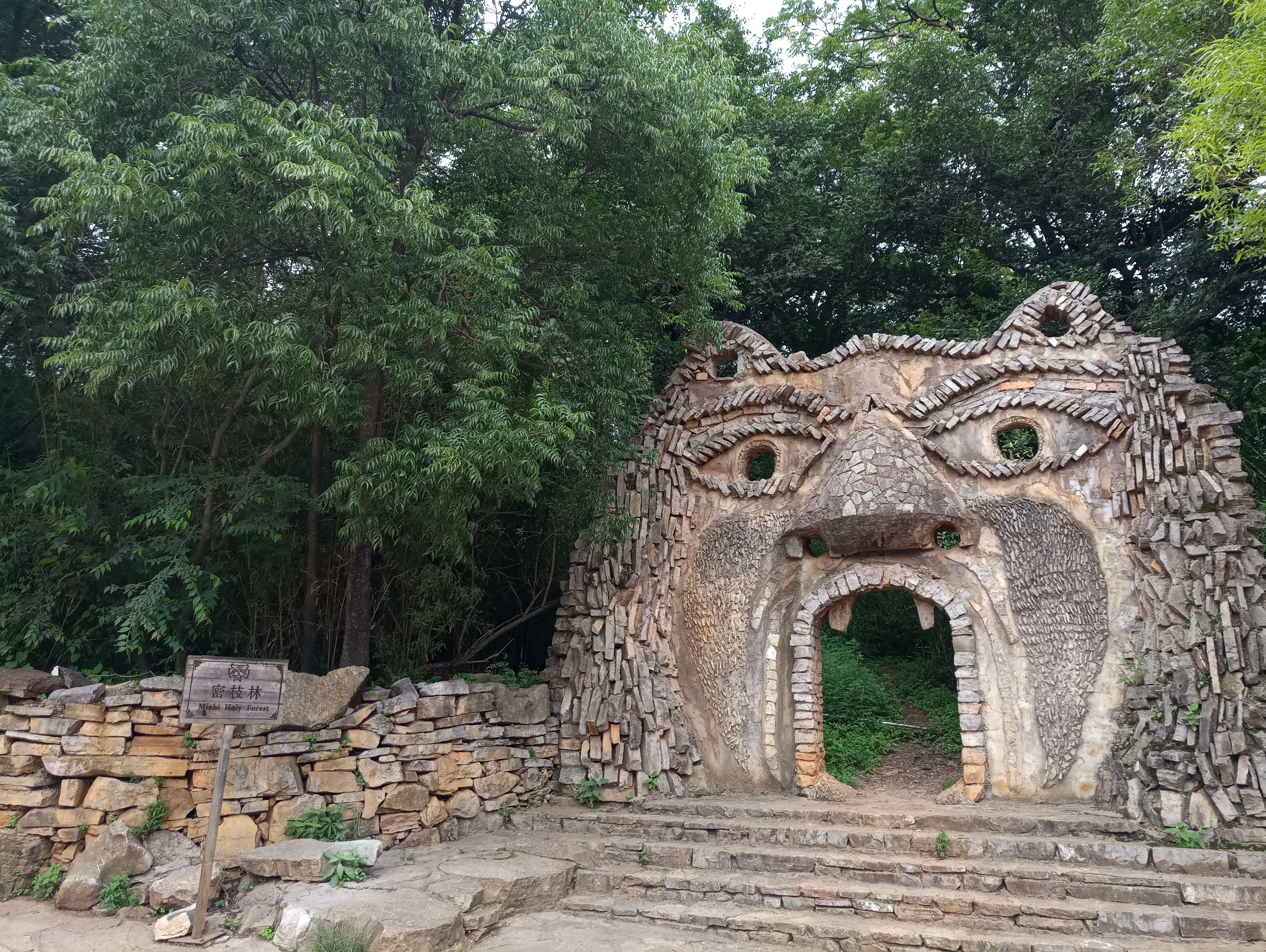 糯黑村-密枝林